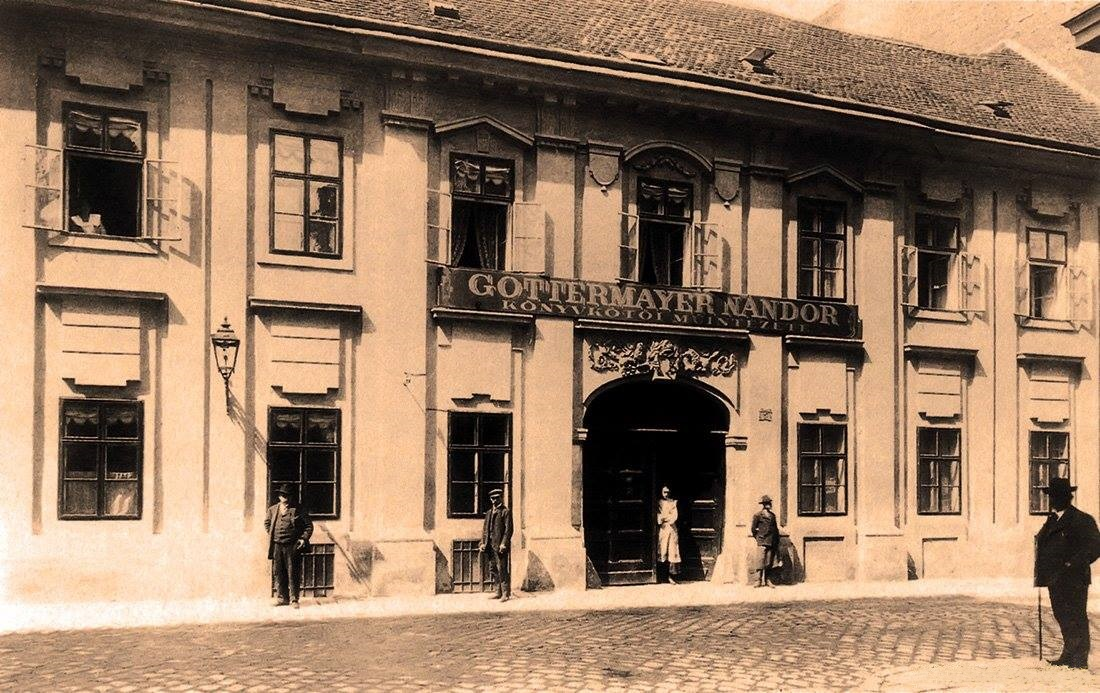 Gottermayer Nándor könyvkötő üzeme a Királyi Pál utca 5. alatt (Budapest)